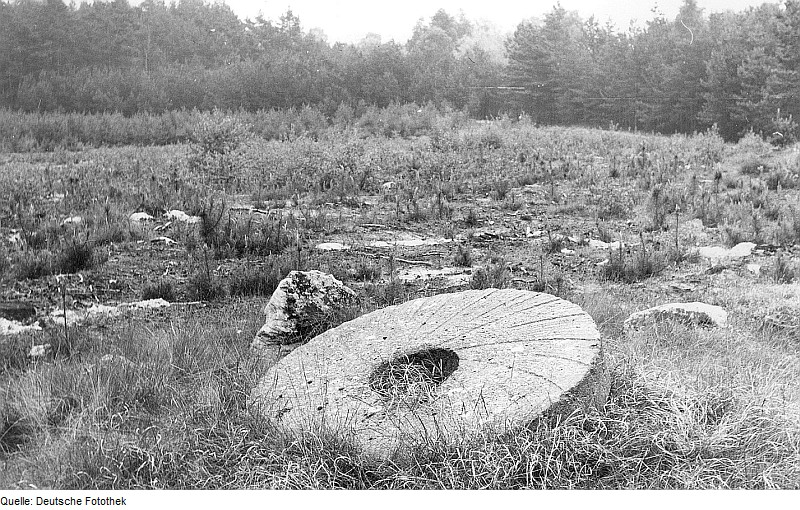 Original image description from the Deutsche Fotothek Vienau-Beese. Ehem. Mühlenstandort mit Mühlstein